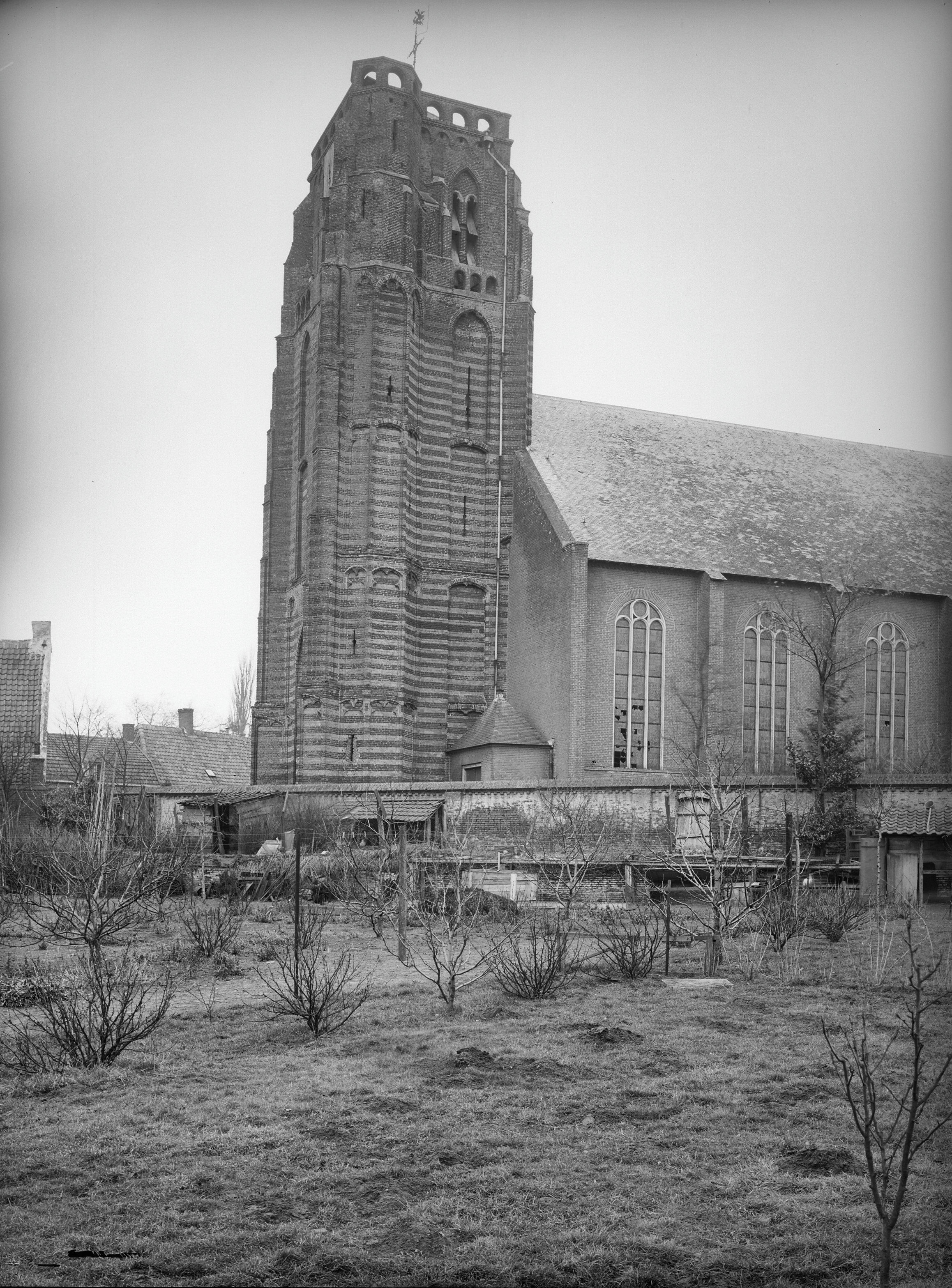 Rooms-Katholieke Kerk: Toren naar het noord-oosten